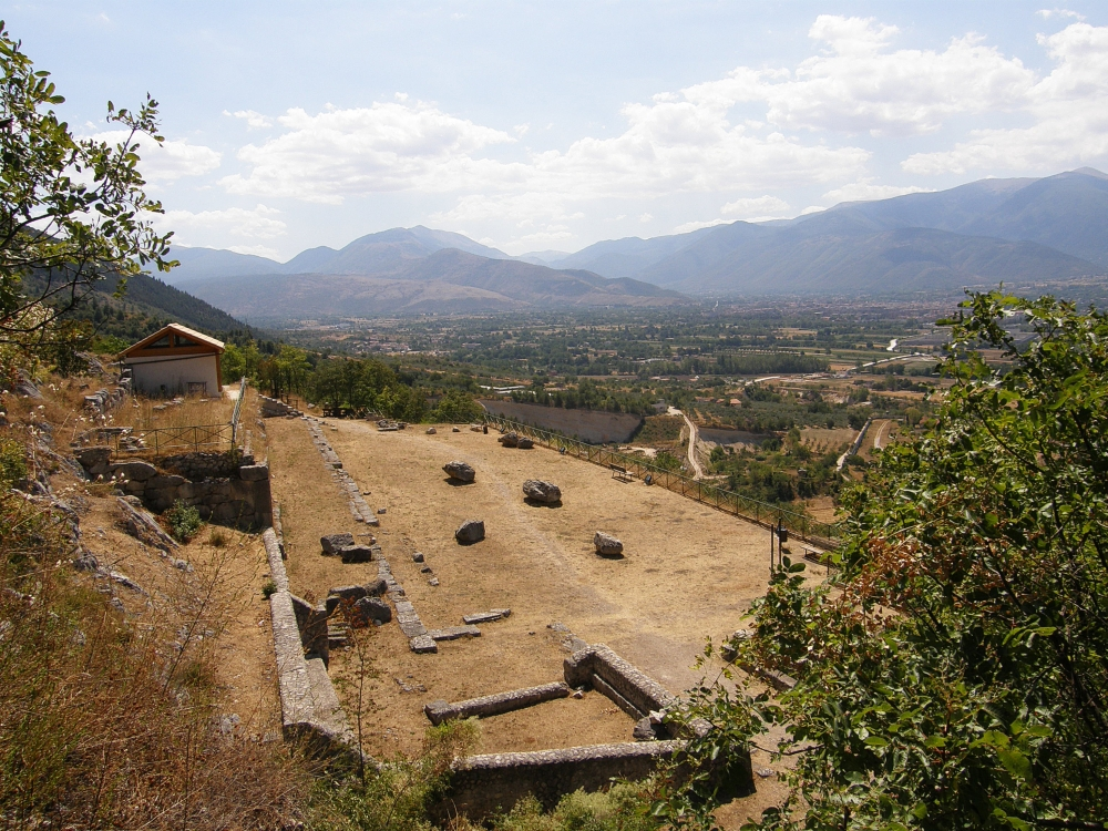 Sulmona